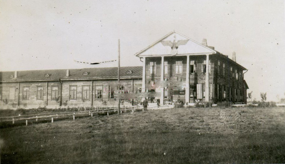 Беларуская (тарашкевіца): Мар'іна Горка (Marjina Horka).